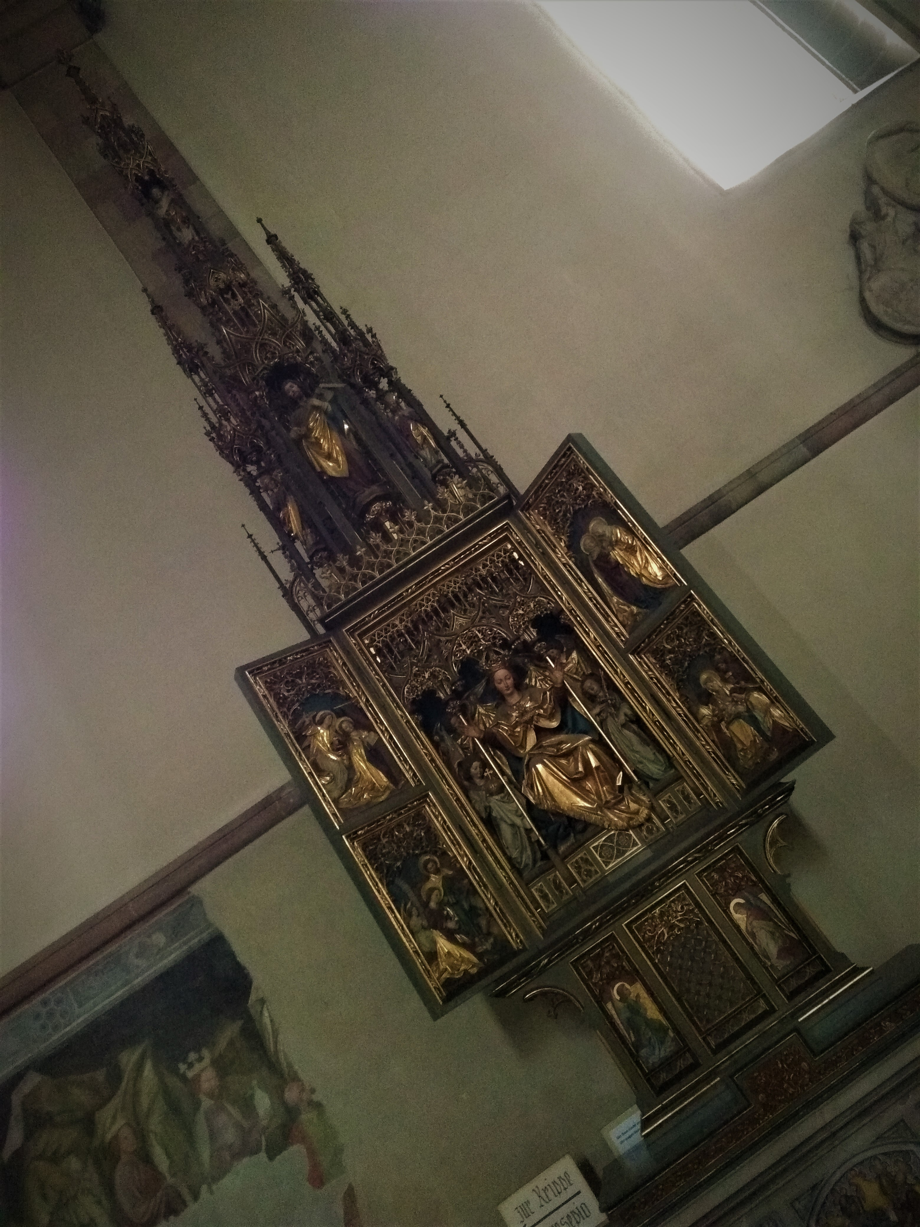 Herz-Mariä-Altar im Bozner Dom, Bozen/Bolzano, Südtirol/Trentino-Alto Adige, Italien